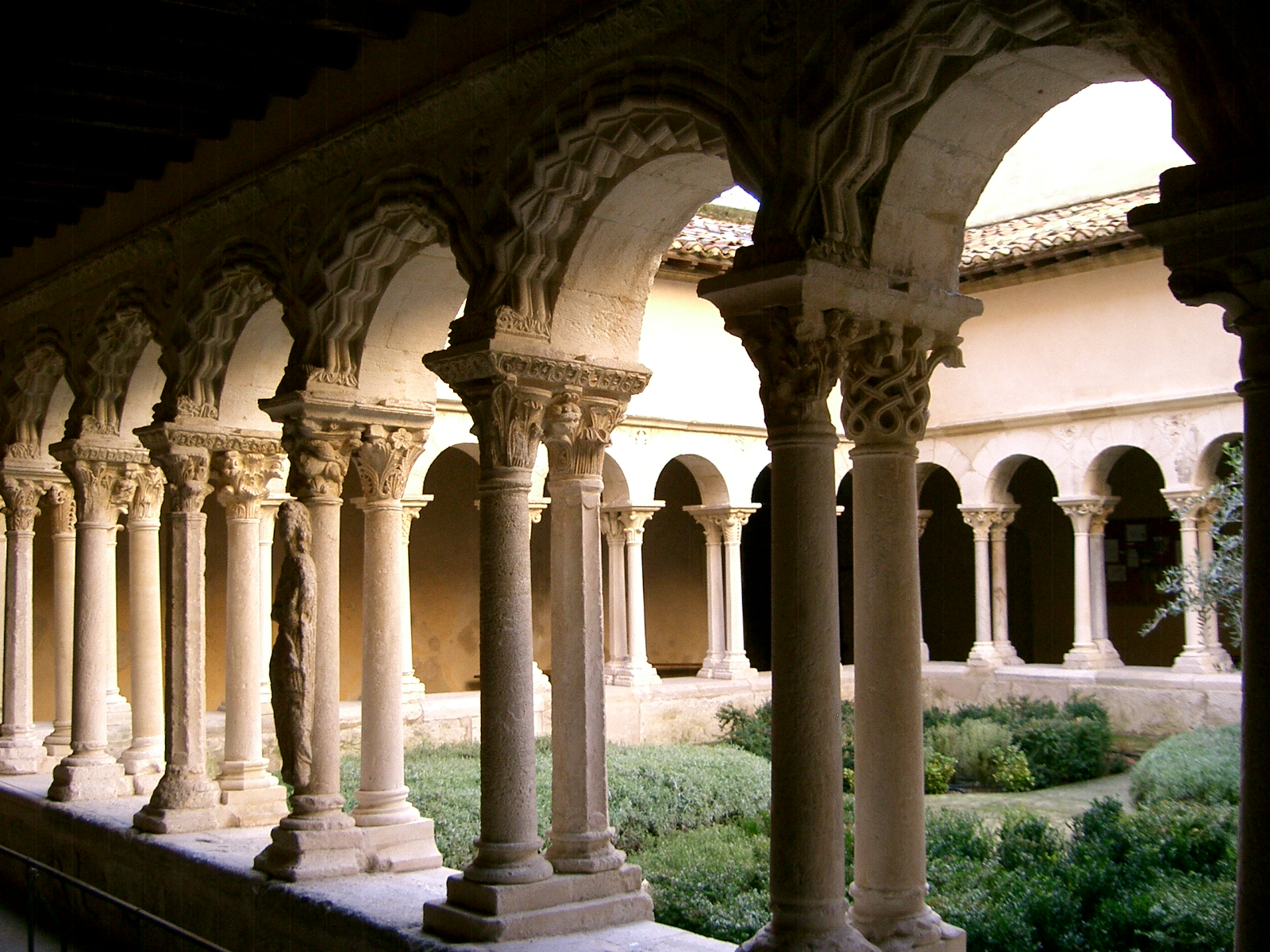 Cloître Saint-Sauveur à Aix-en-Provence (Bouches-du-Rhône, France)